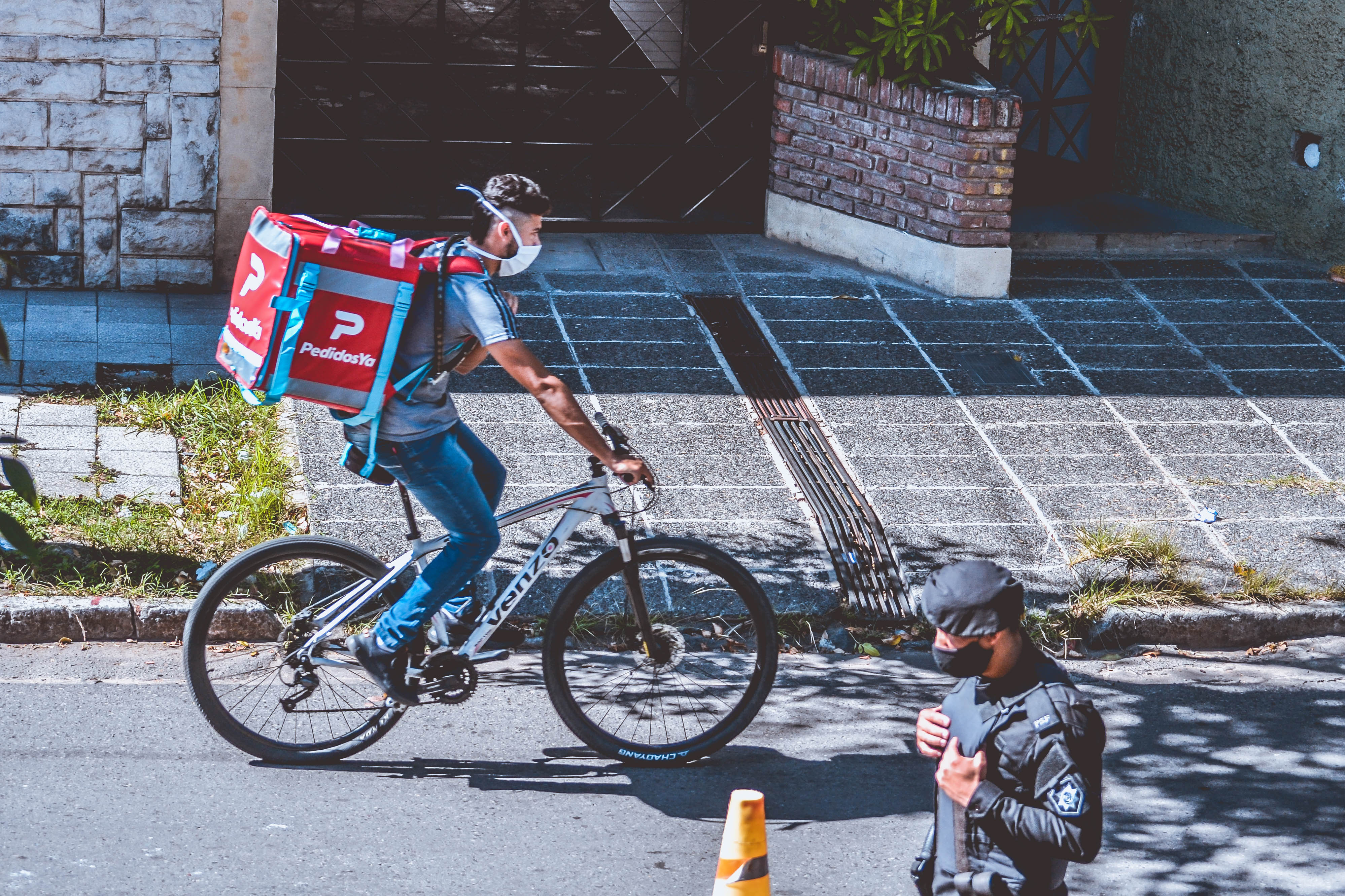 COVID-19 pandemic coronavirus santa fe